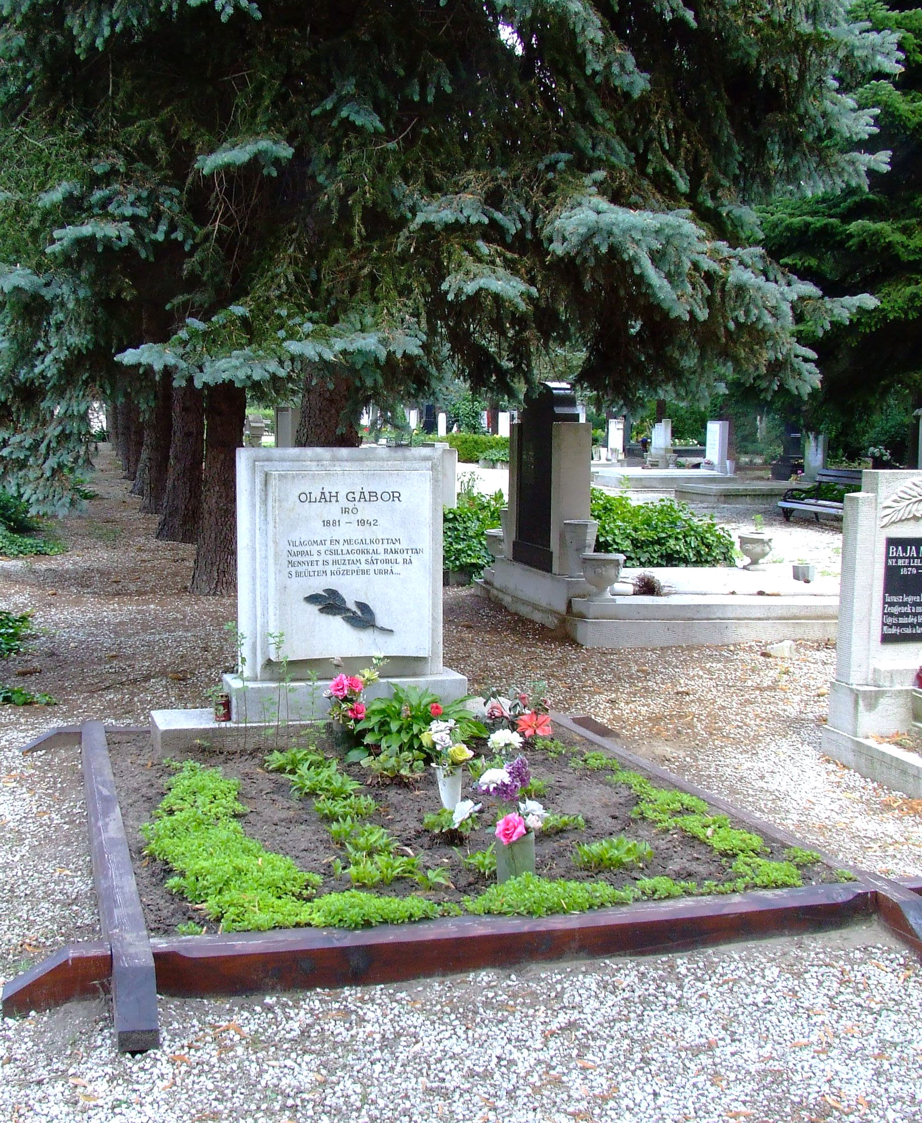 Oláh Gábor író sírja a debreceni köztemetőben